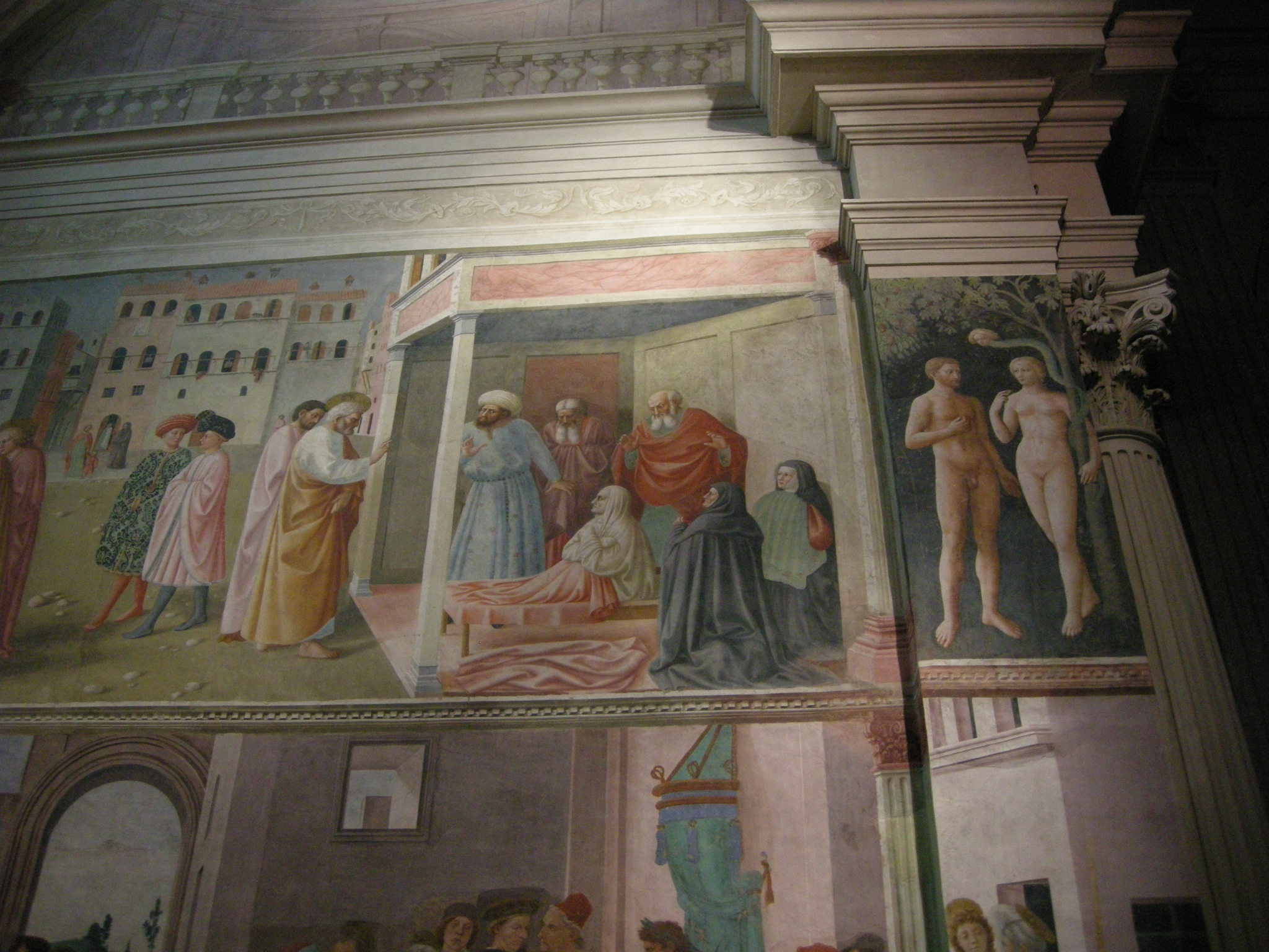 after restauration